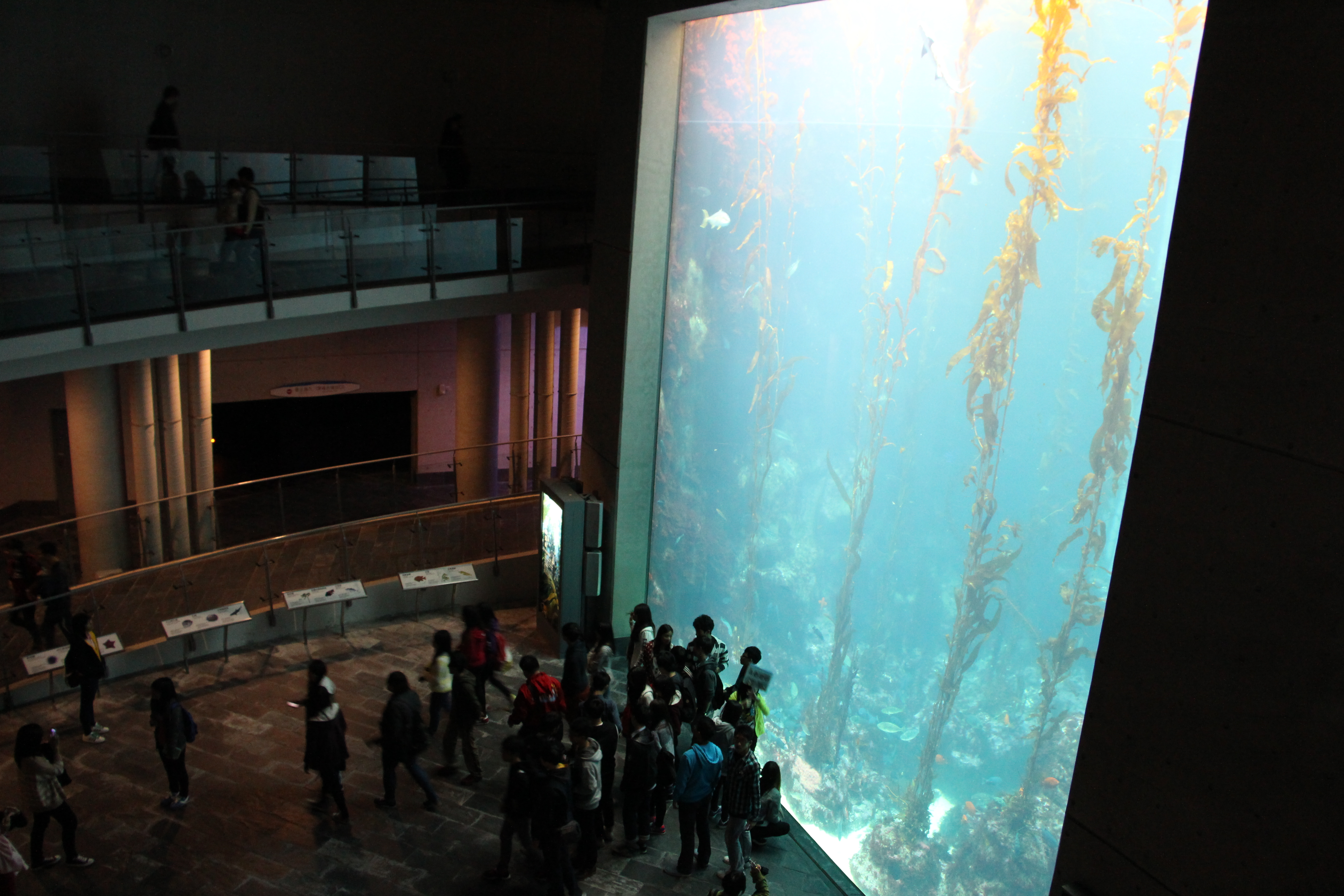 國立海洋生物博物館巨大海藻林。